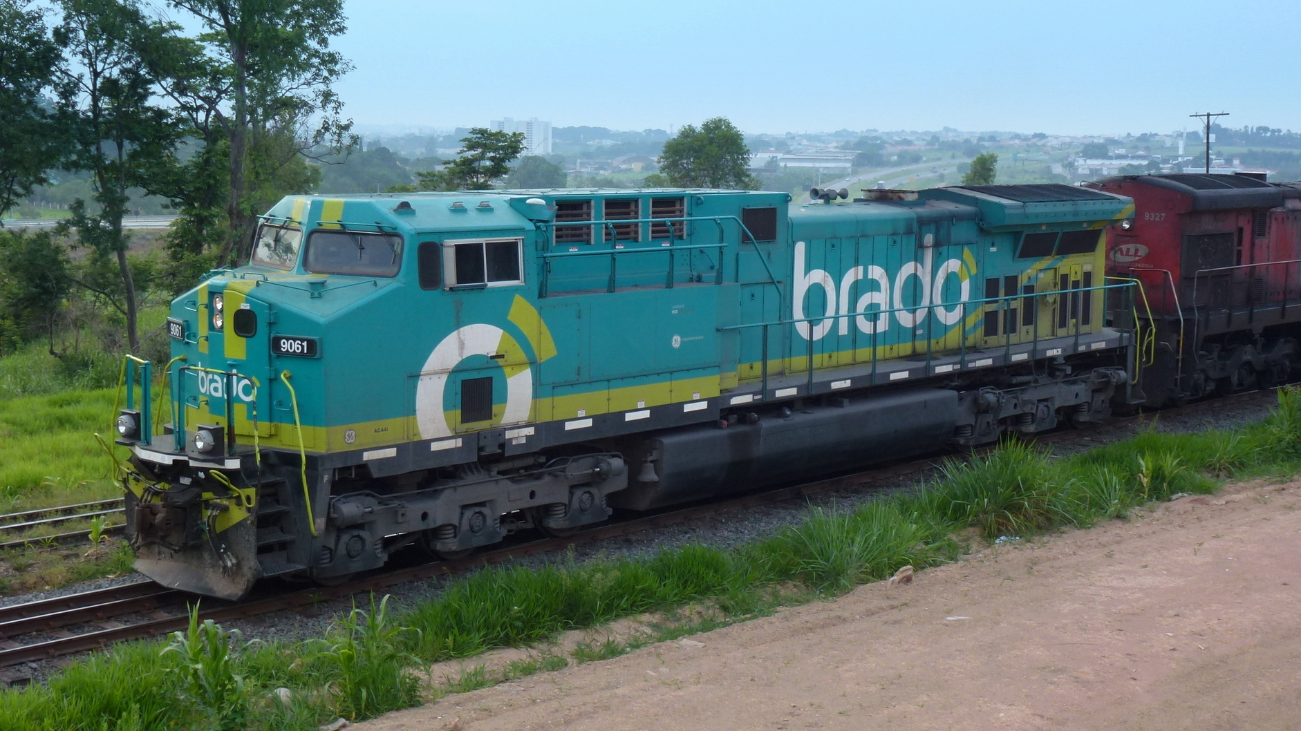 Locomotiva de comboio parado sentido Boa Vista no pátio da Estação Ferroviária de Itu - Variante Boa Vista-Guaianã km 203.